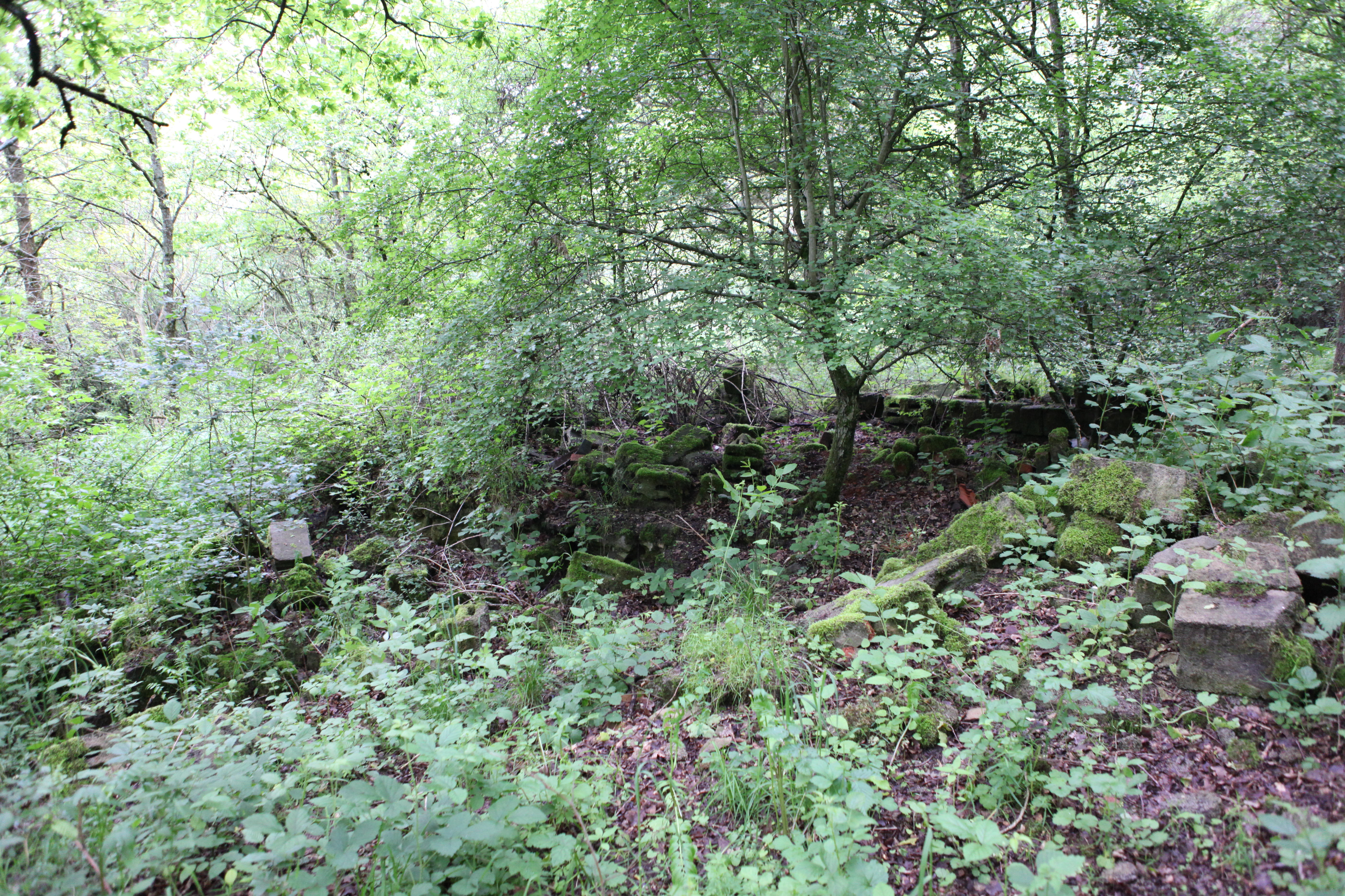 Rothhof, Gebäudereste